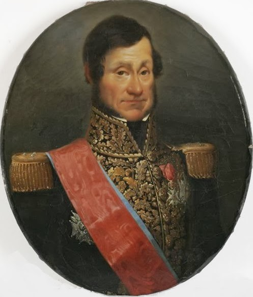 Pierre César Gudin des Bardelières (1775-1855), général de brigade sous le Premier Empire et lieutenant-général sous la Restauration.